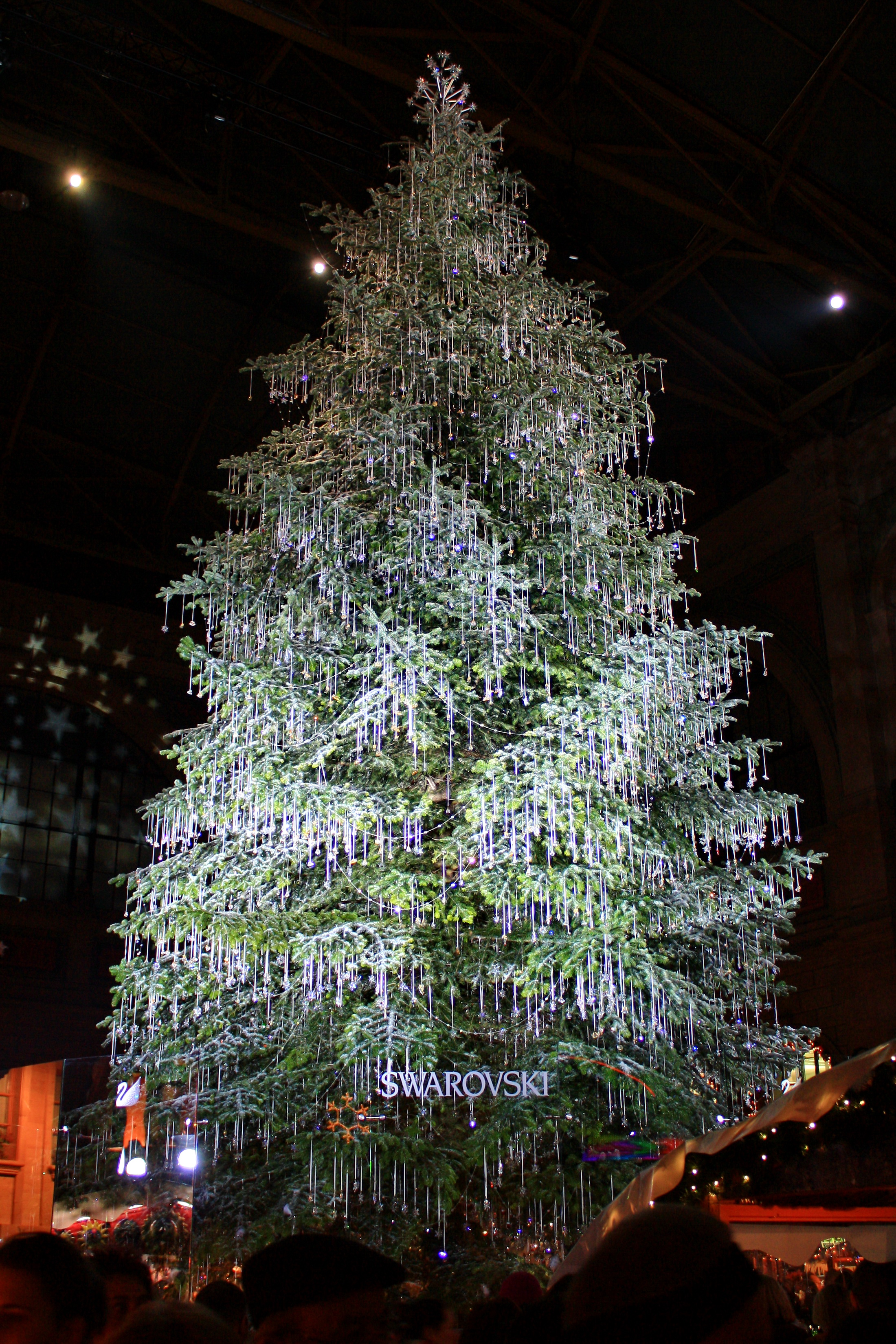 Swarovski Christmas trese in Hauptbahnhof in Zürich (Switzerland)